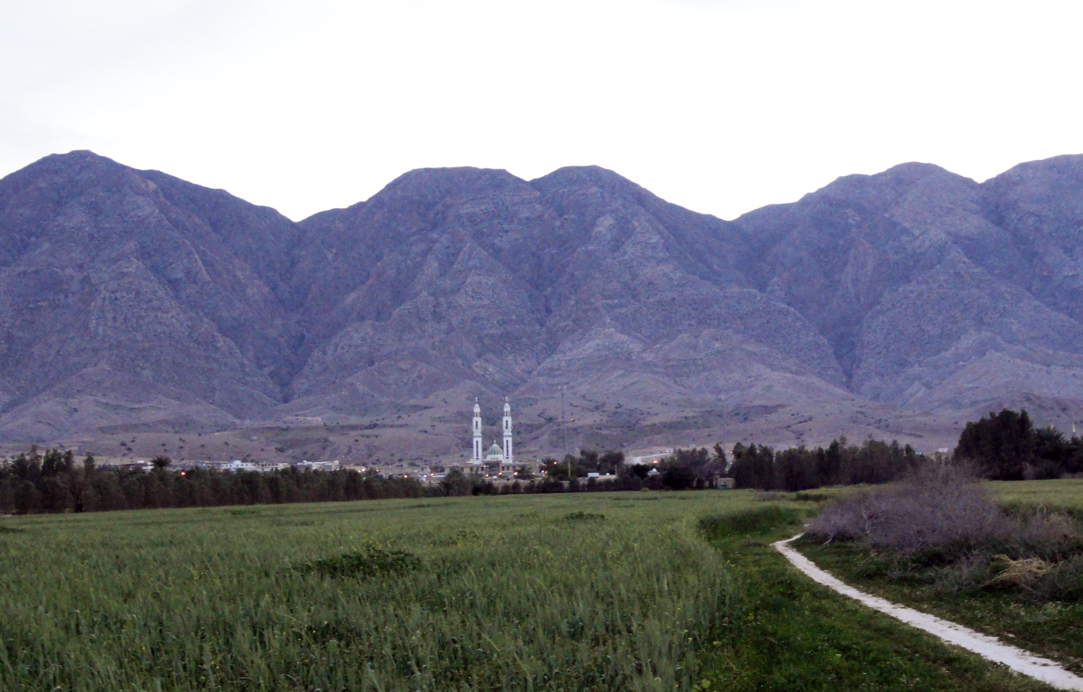 کوه نر، جنوب بخش علامرودشت، استان فارس